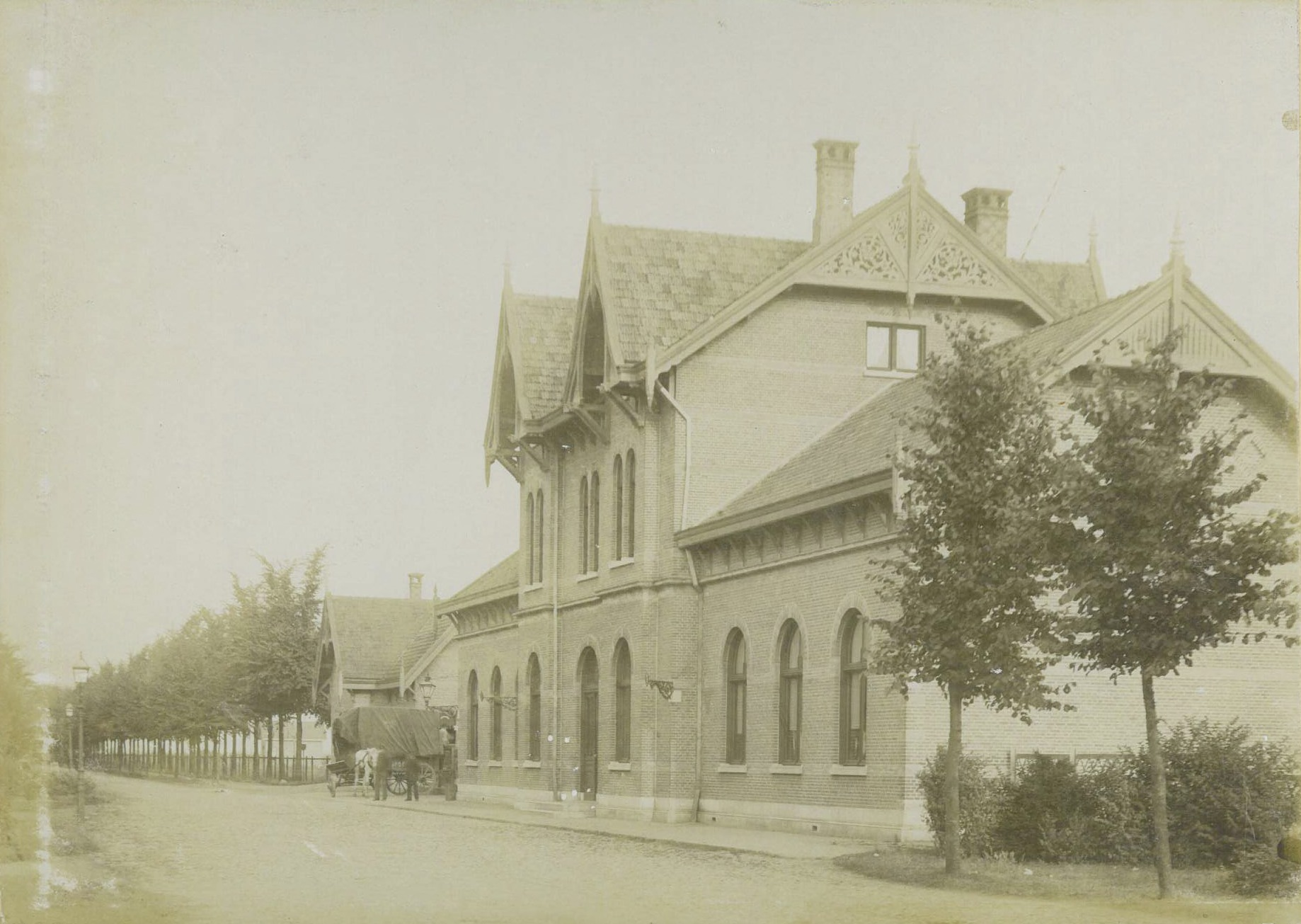 Foto van het station in Waalwijk uit het fotoalbum van Bernard Timmermans-van Turenhout.